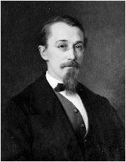 Bernhard Reinholdin maalama muotokuva professori Georg Zacharias Forsmanista.